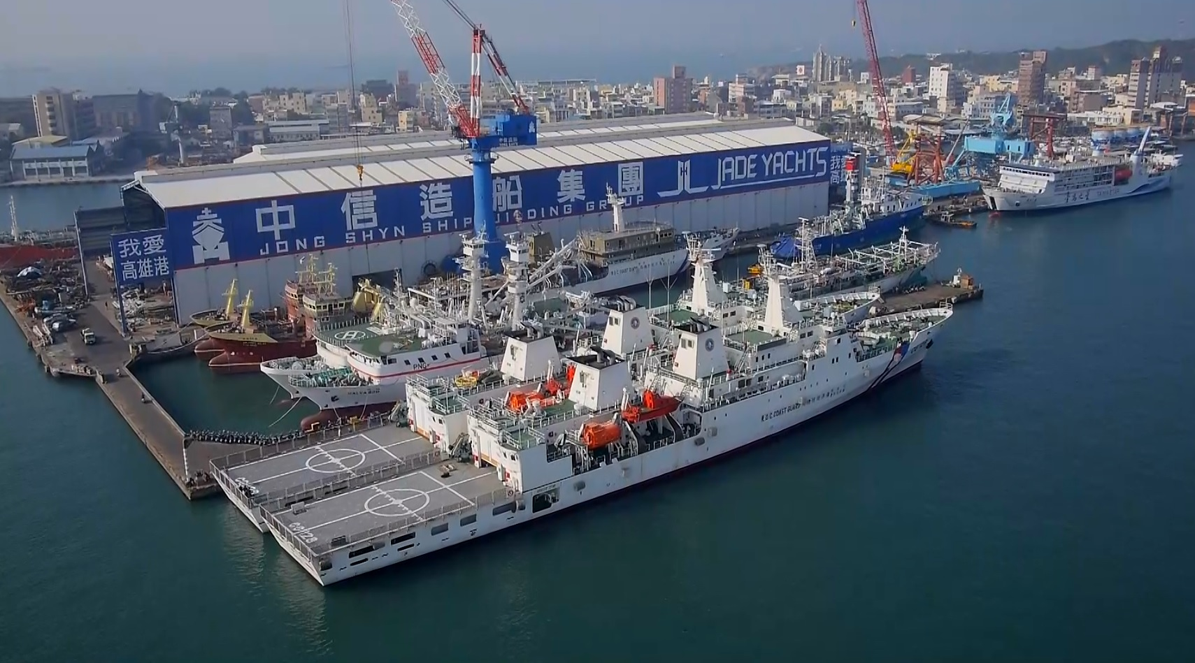 中信造船集團-順嶸廠空拍圖